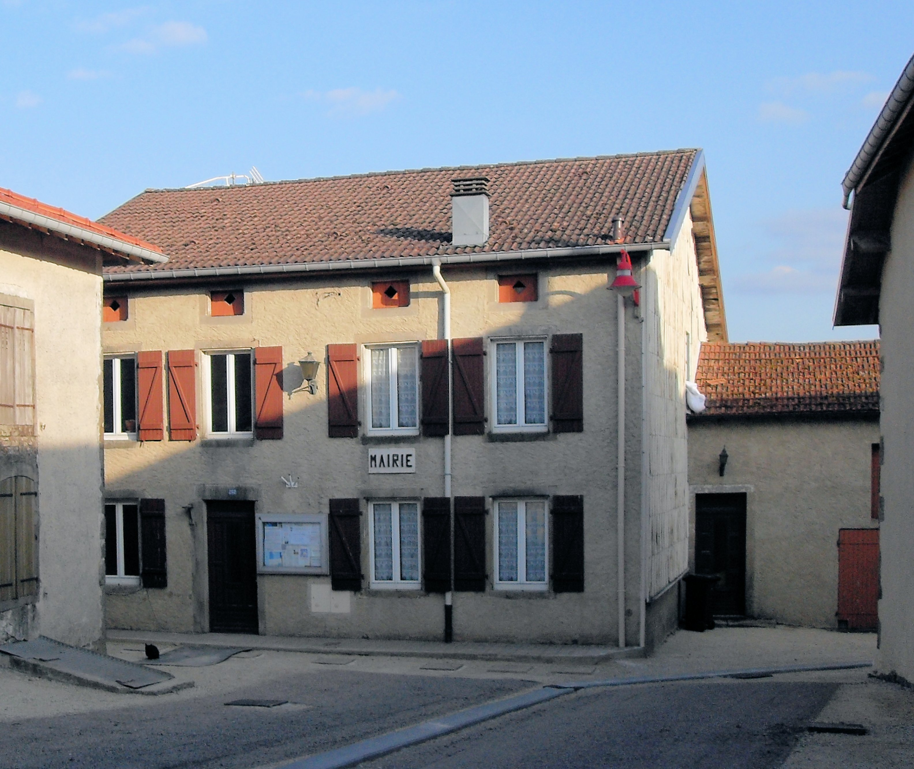 La mairie de Jésonville